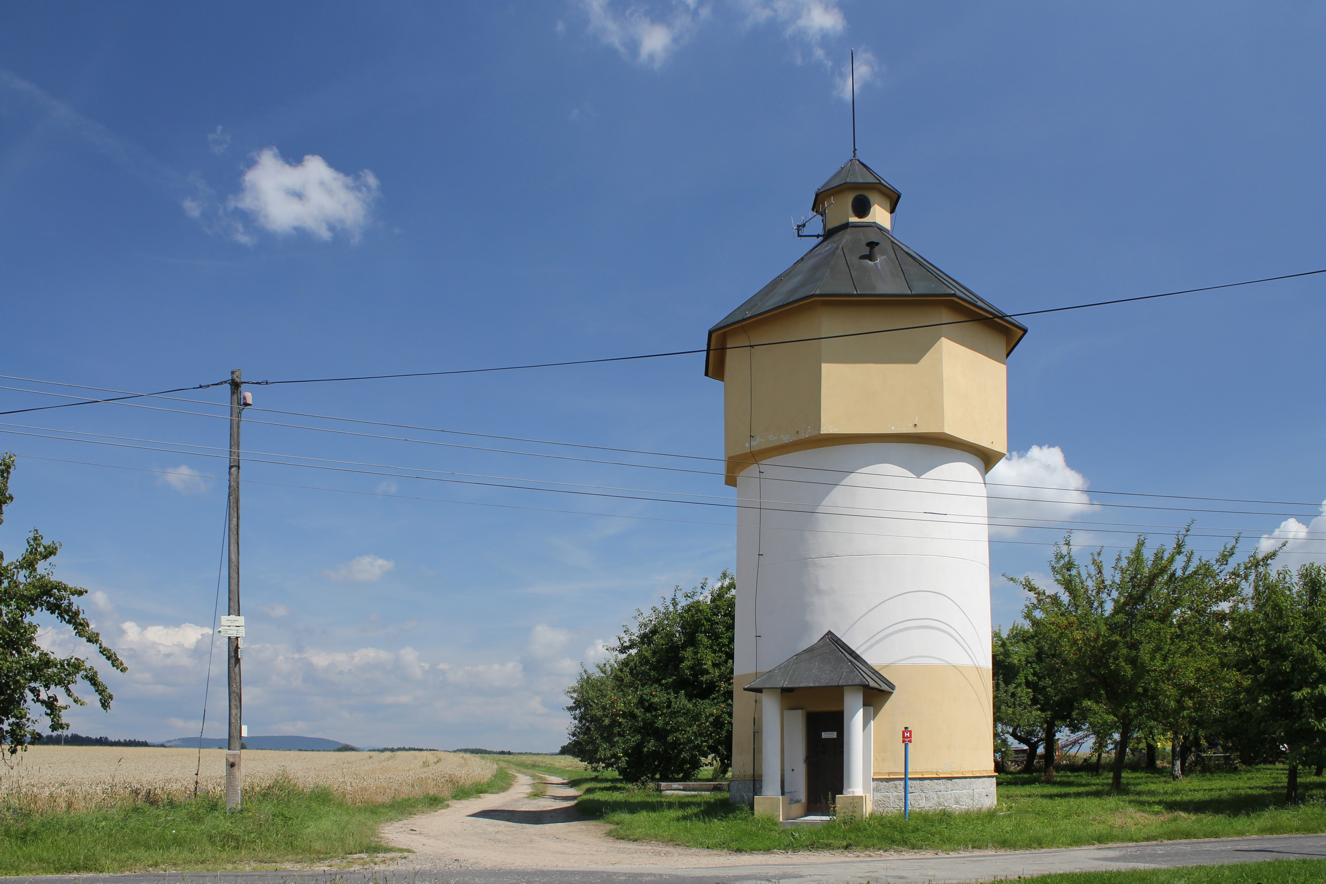 Sedlisko, Kobyly